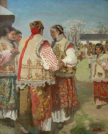 І. Труш "Гуцулки біля церкви"